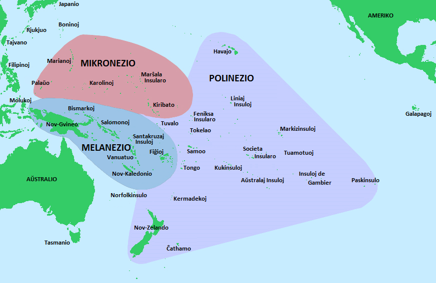 Kultur-regionoj de Oceanio: Mikronezio, Melanezio kaj Polinezio.